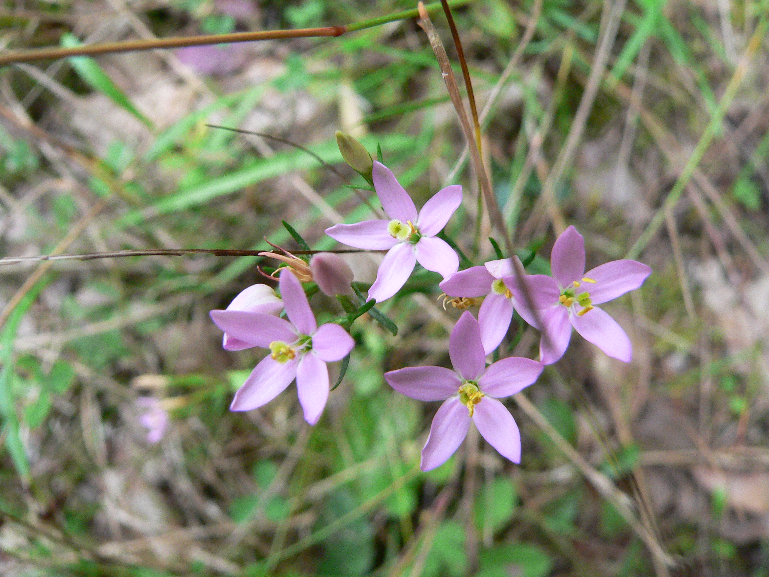 Centaurium erythraea (Echtes Tausendgüldenkraut), Spessart, Germany